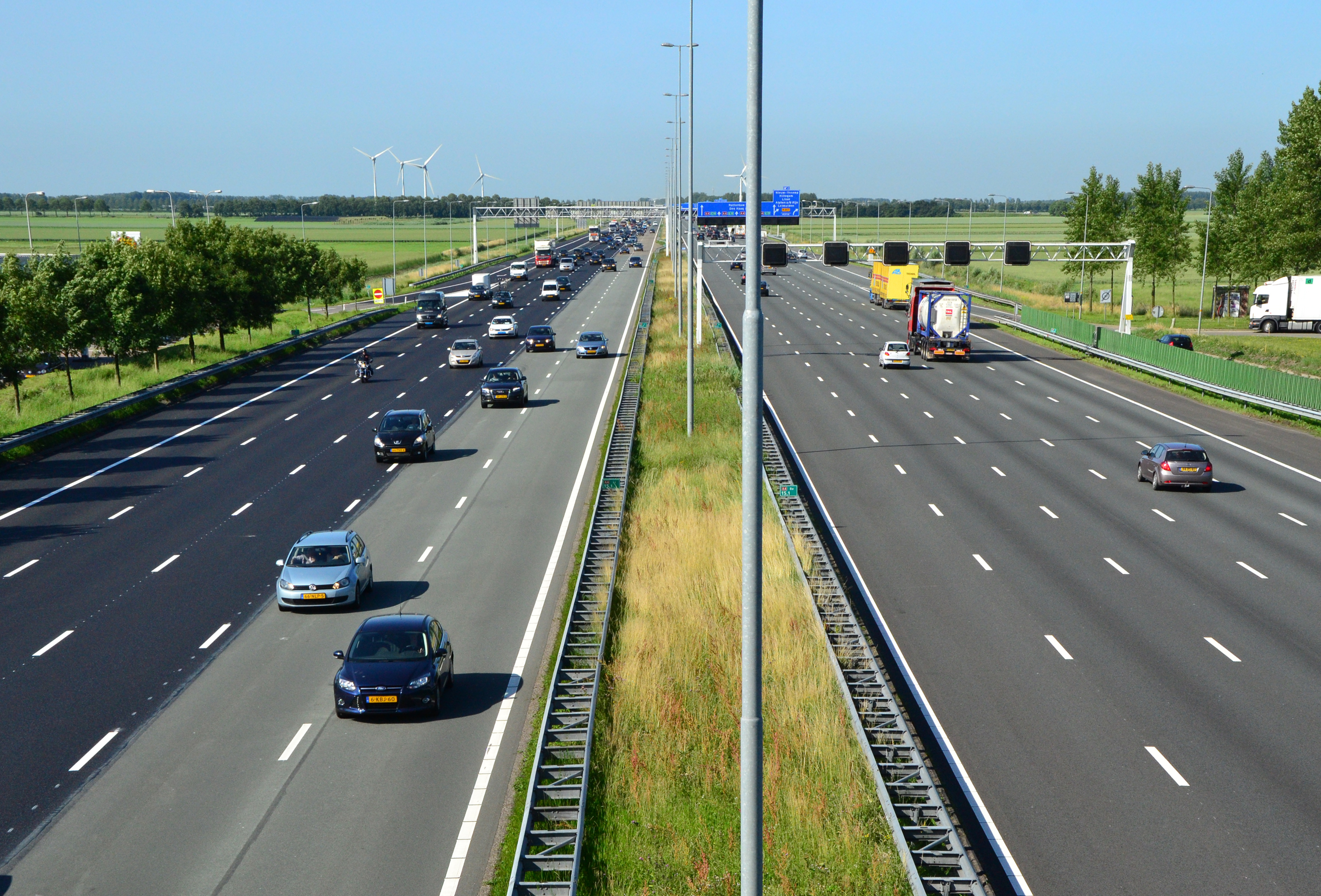 Blick auf den zehnspurigen Rijksweg 4 bei Hoofddorp .